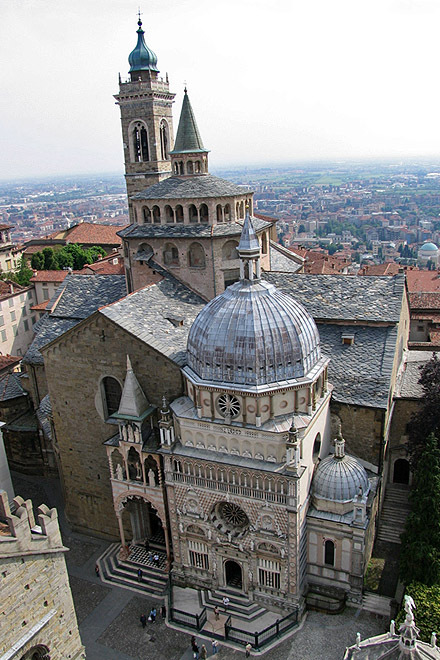 Cappella Colleoni - Bergamo